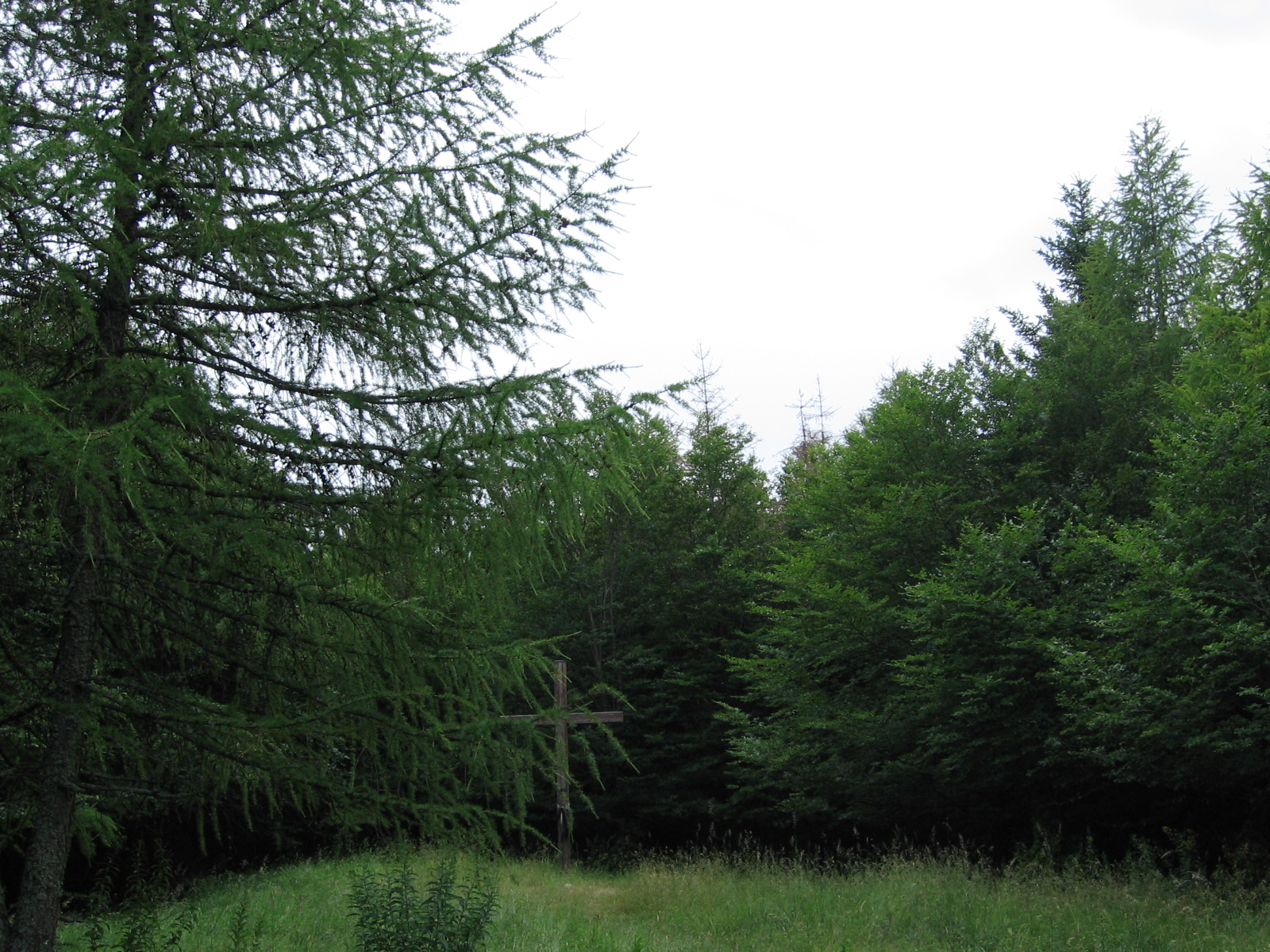 Ennyi kilátás van Istállós-kőnél. Kettős-bércnél sem jobb a helyzet.